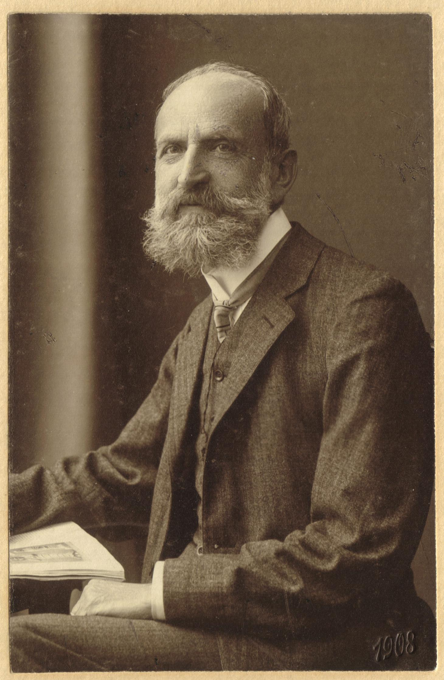 Carl Georg Weitzel, Gründer des Technikums Mittweida